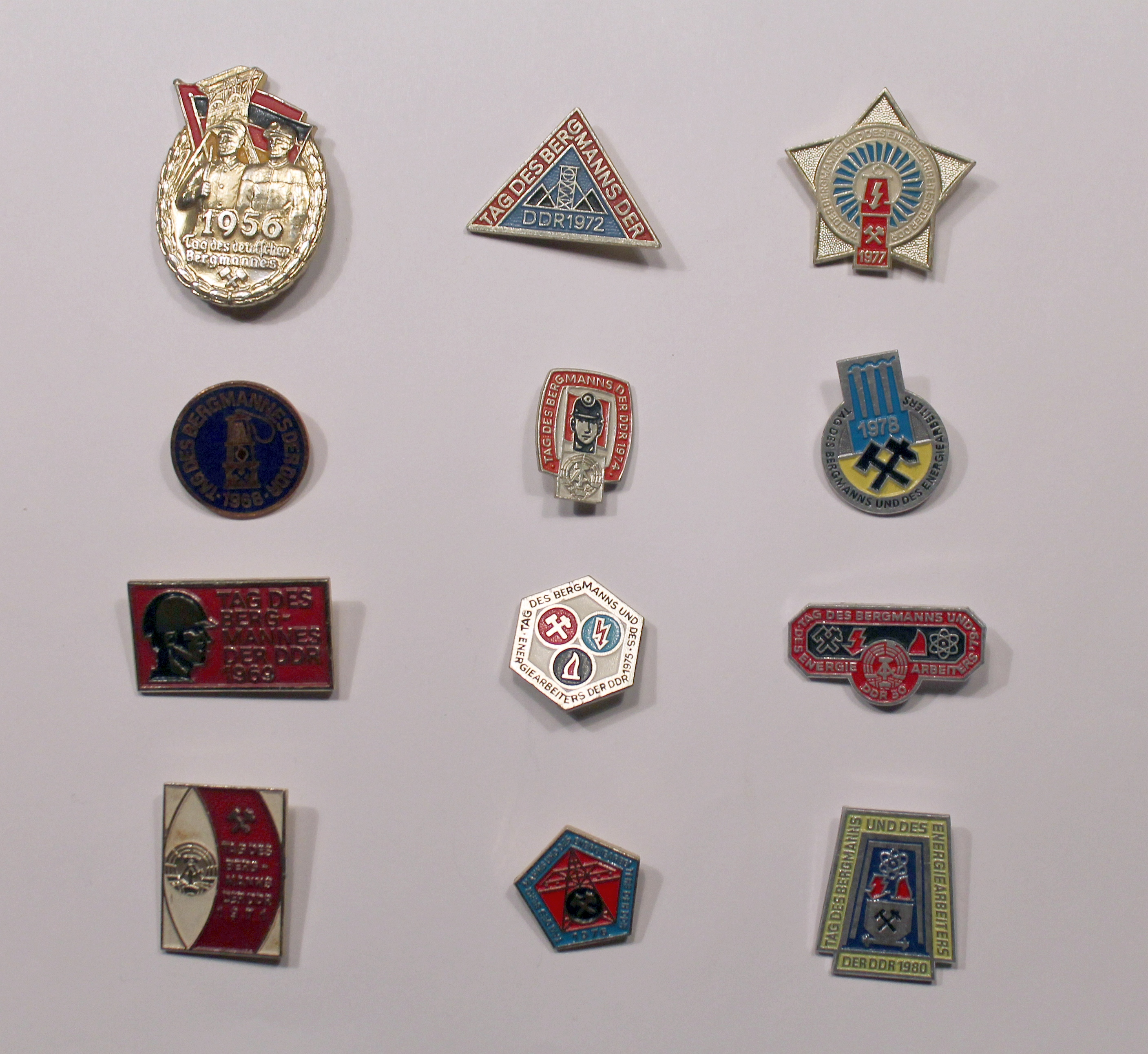 Abzeichen zum Tag des deutschen Bergmanns aus verschiedenen Jahren.